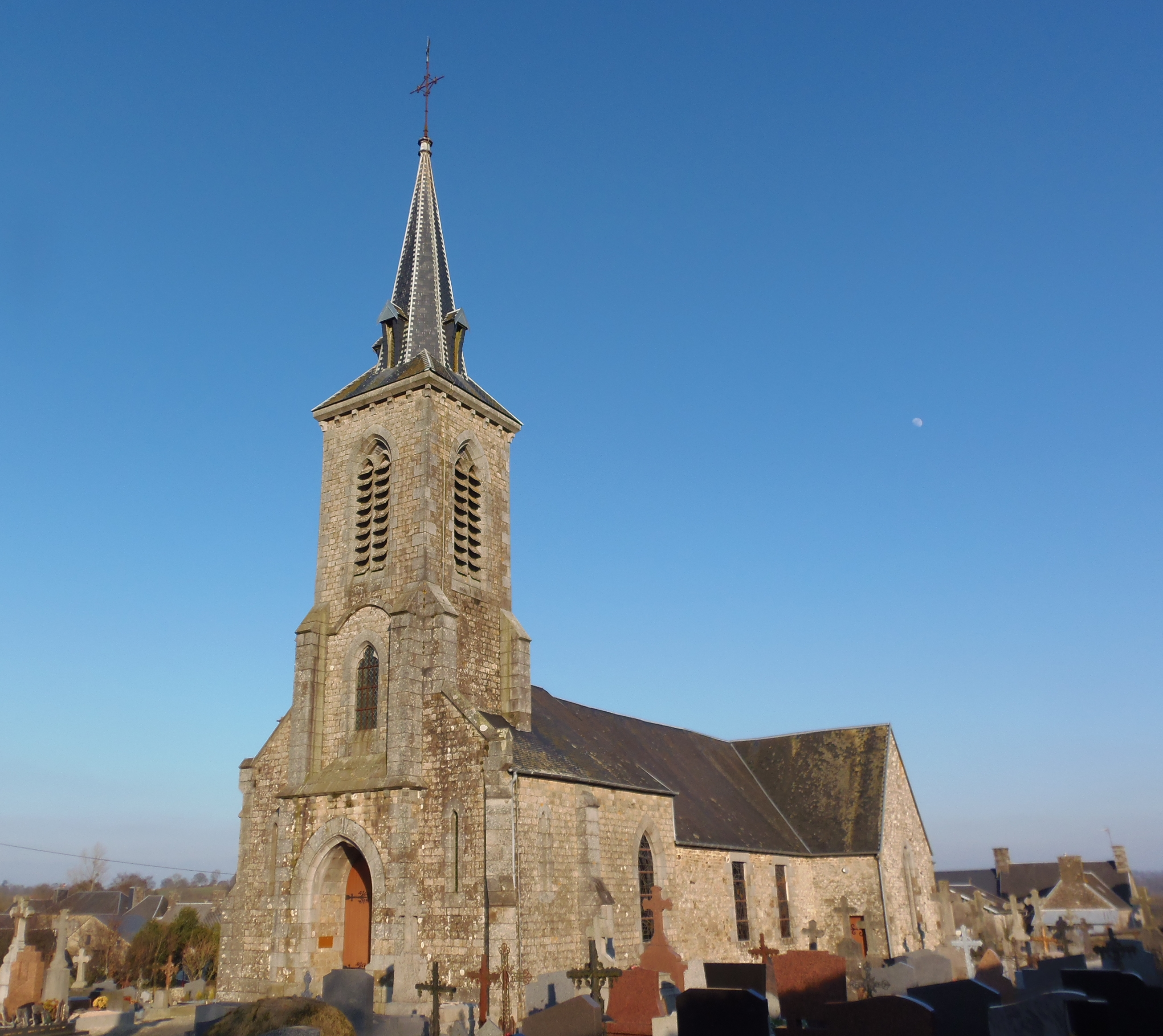 Chérencé-le-Héron (Normandie, France). L'église Notre-Dame.